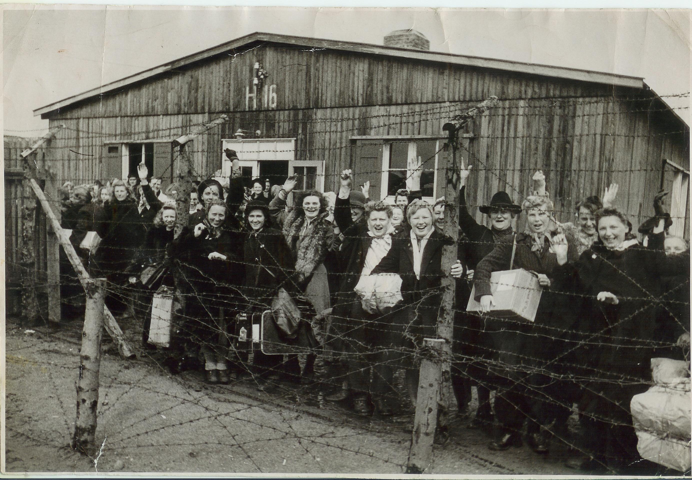 Jublende kvinder foran kvindebarakken i Frøslevlejren forud for løsladelsen den 5. maj 1945.